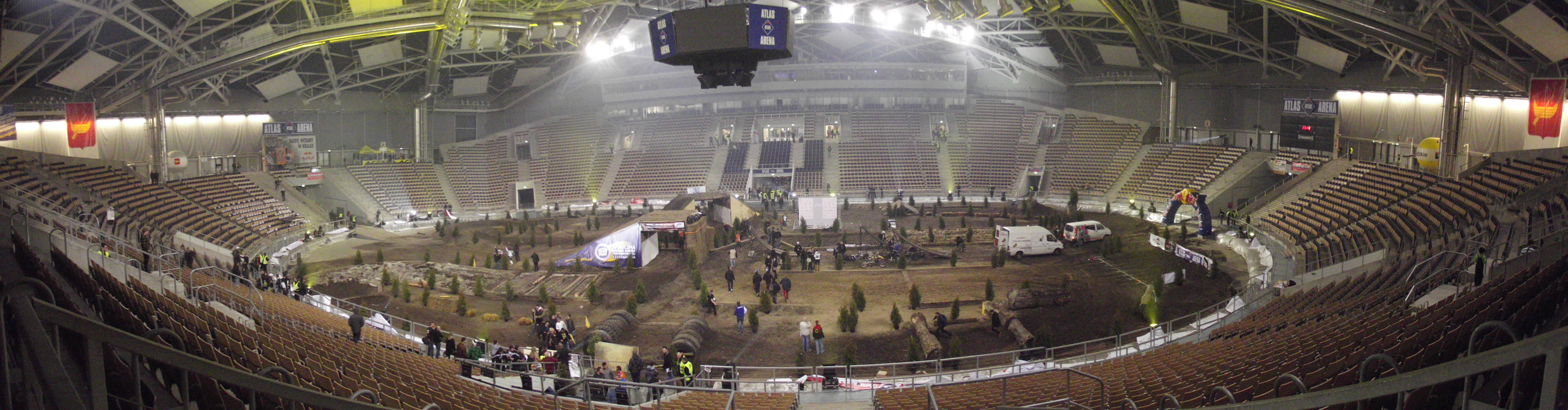 2012 FIM SuperEnduro World Championship in Łódź (10.12.2011)